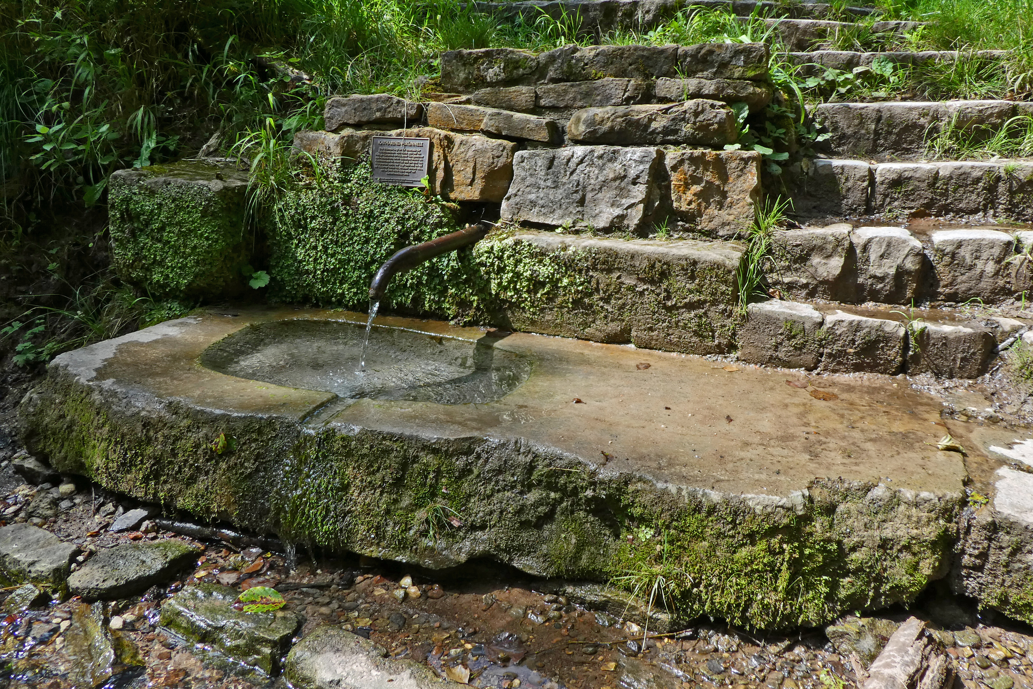 Das Katharinenbrünnele am Brunnenwandernweg Wäldenbronn